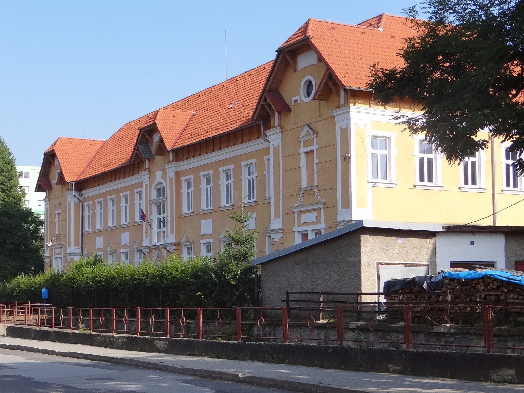 Dobšiná